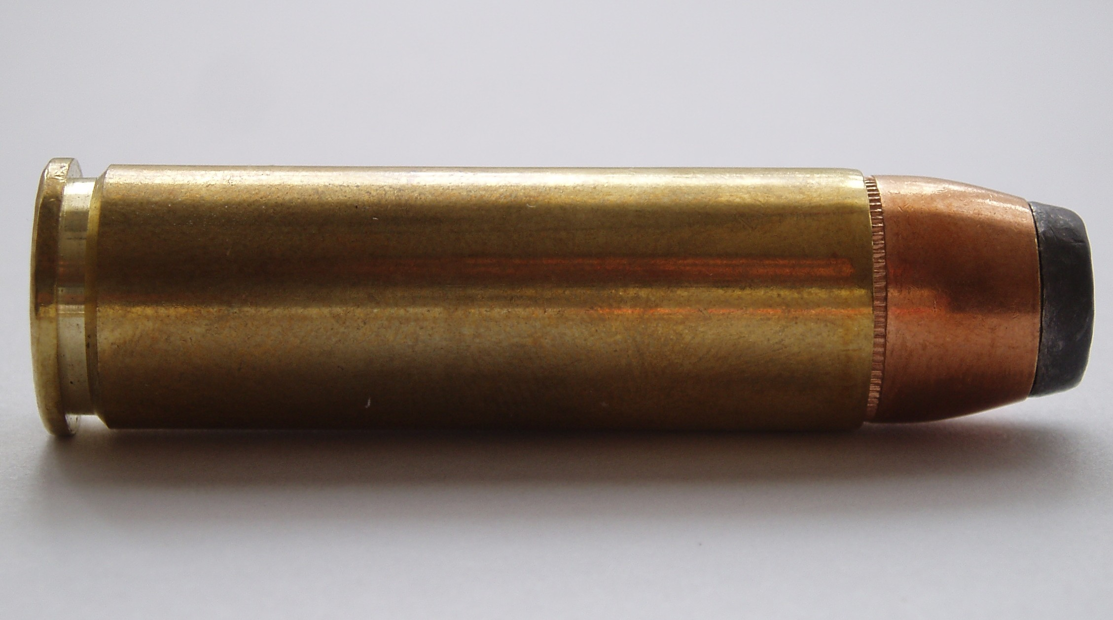 .500 SW Magnum revolver cartrdige.SP bullet.